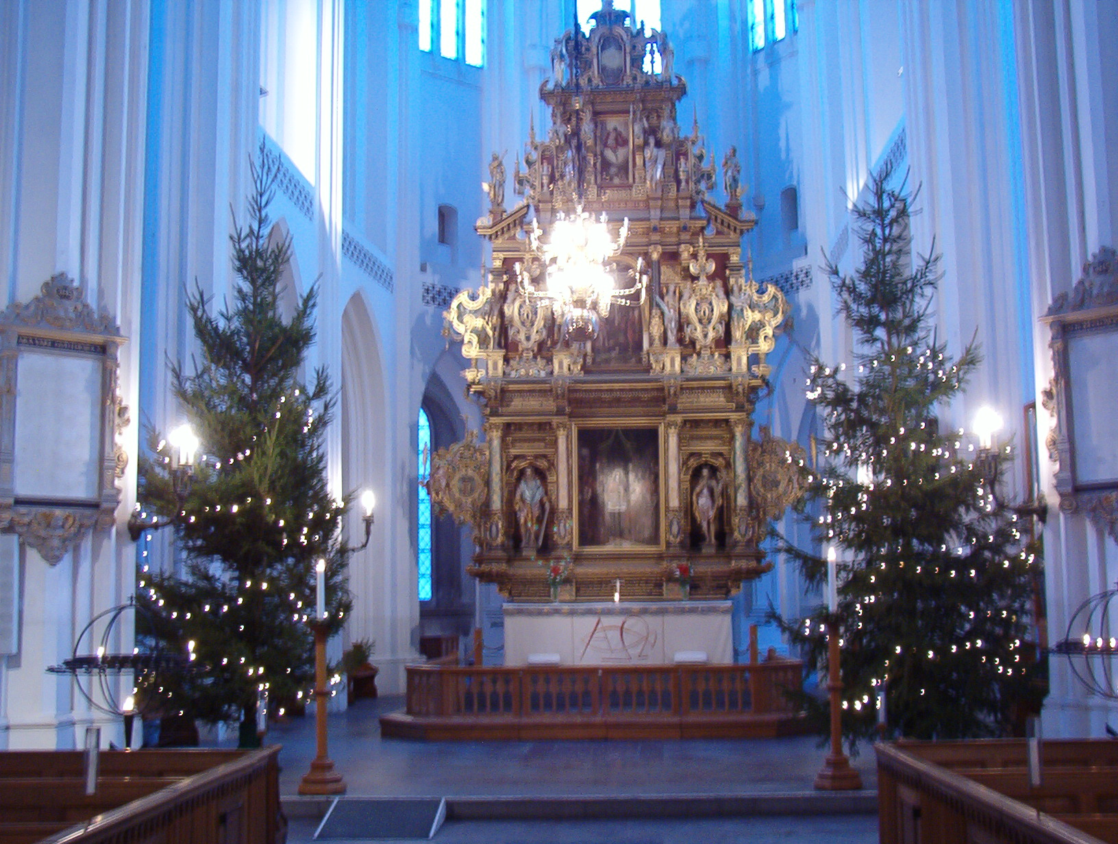 Sankt Petri kyrka, Malmö, altar in December.jpg Date: December 29 2005